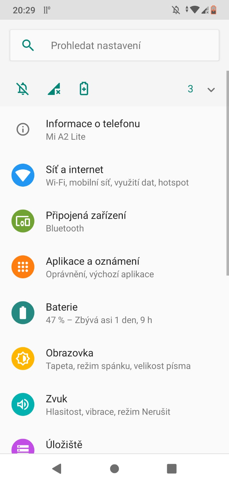 Obrazovka nastavení v telefonu Xiaomi Mi A2 Lite